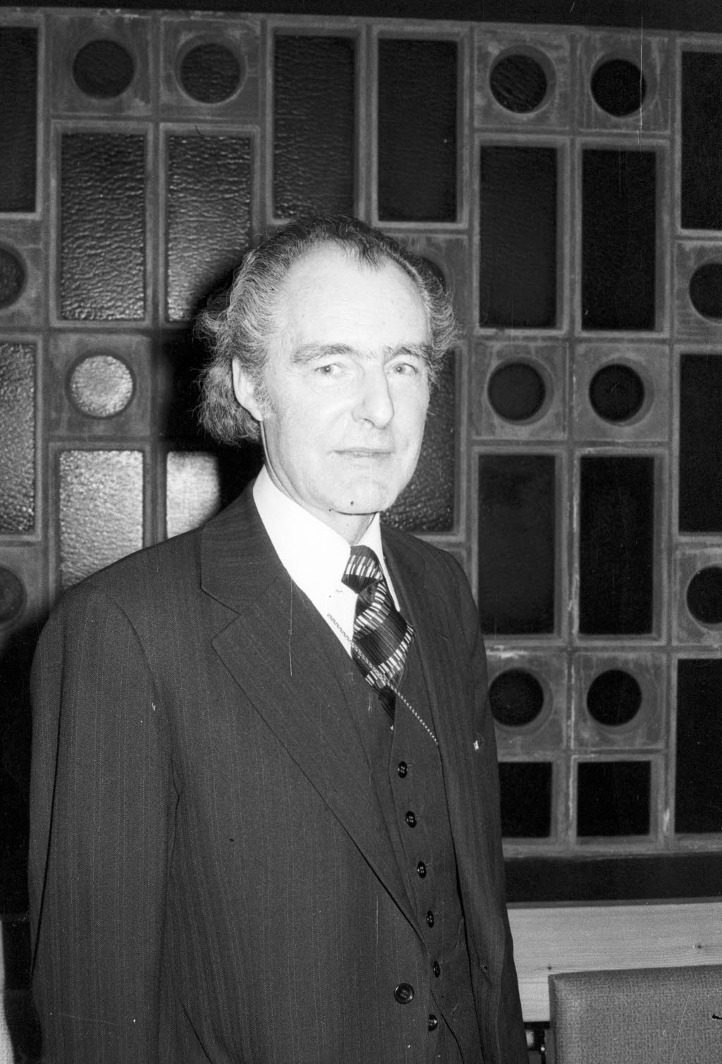 Der Bischof der lutherischen Kirche von Island, referiert in der Vortragsreihe "Nordische Nachbarkirchen stellen sich vor" in der Evangelischen Stadtakademie im Gemeindehaus Jägerberg 16.